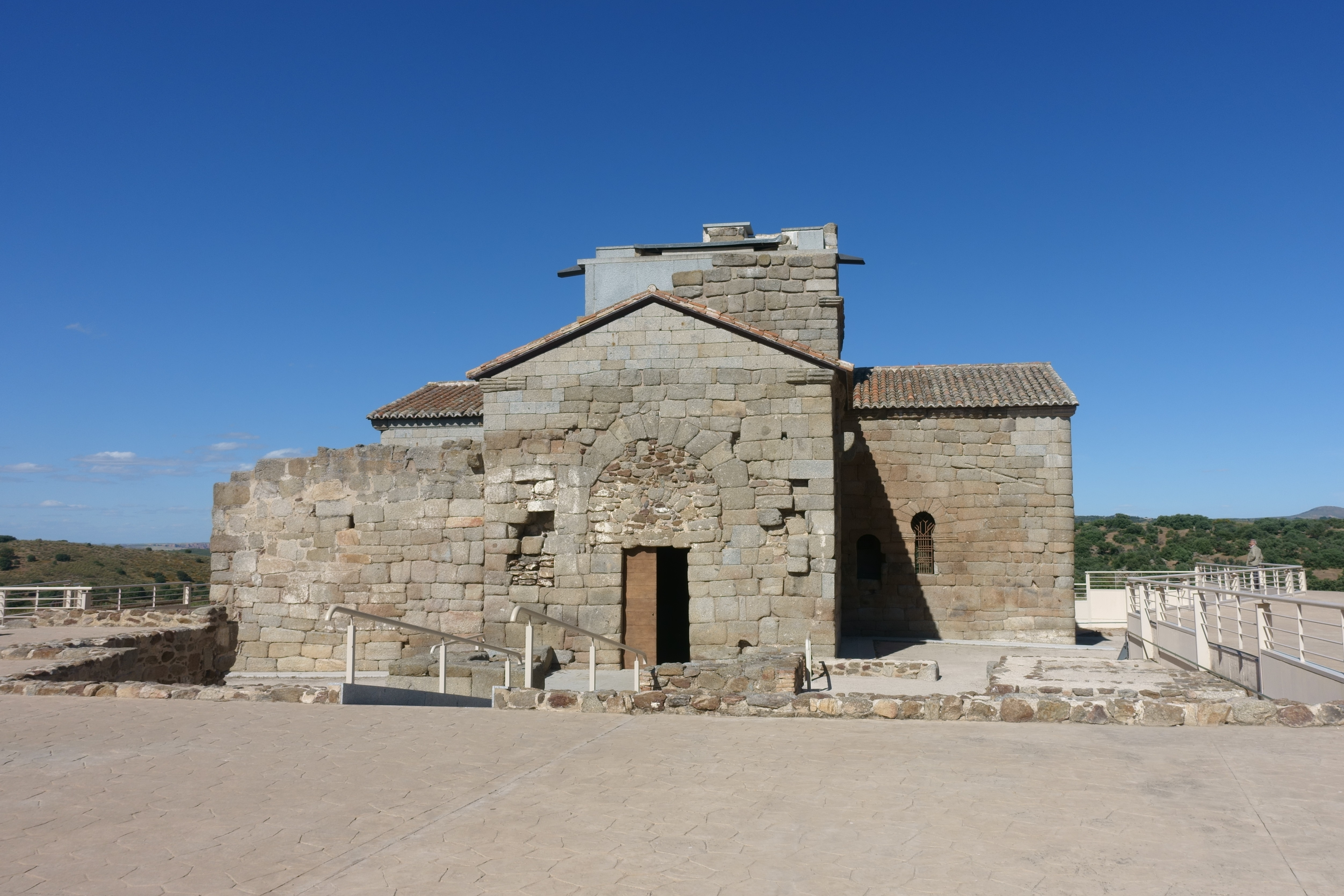 Exterior de la iglesia de Santa María de Melque, en San Martín de Montalbán (Toledo, España).